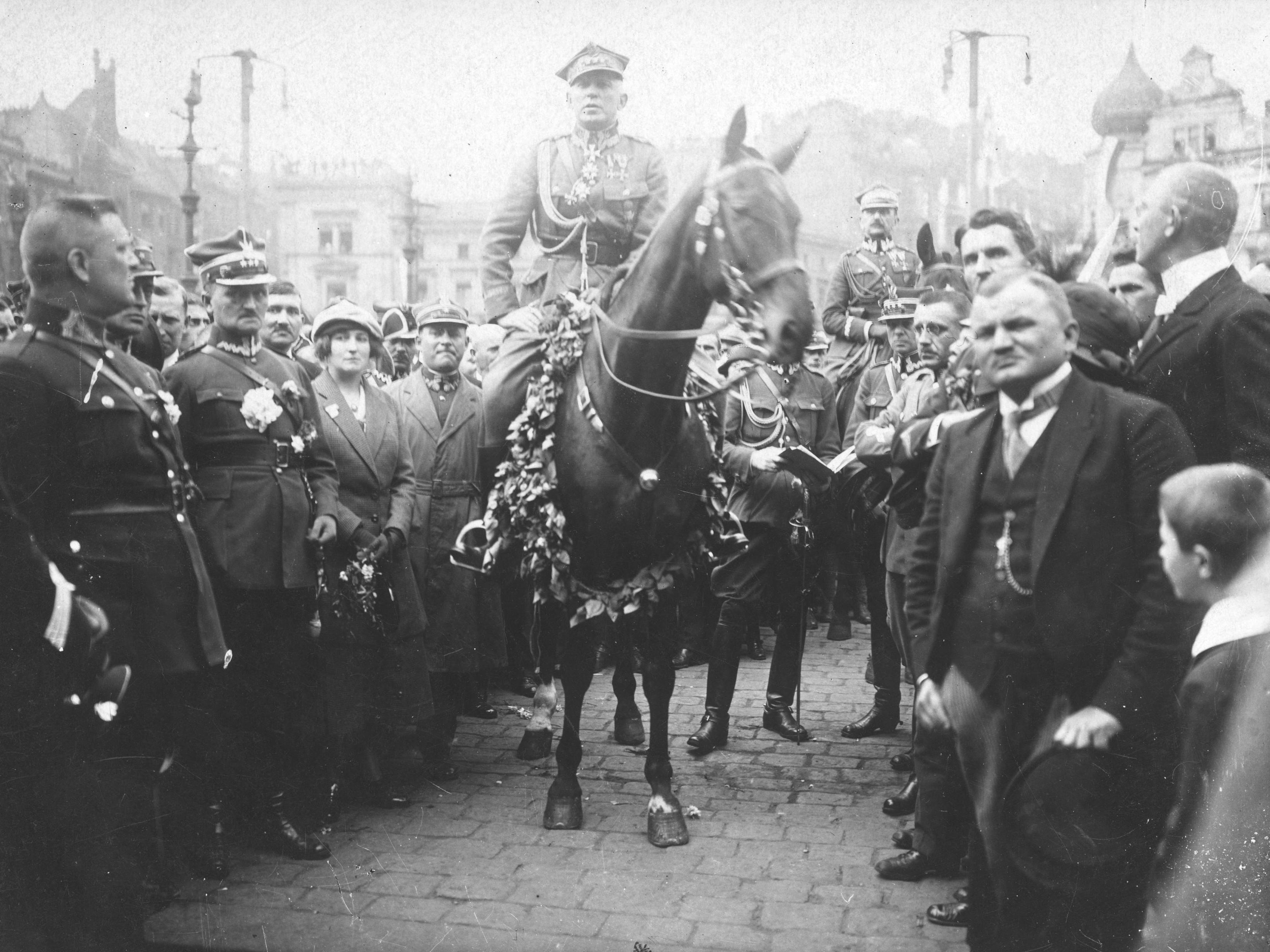 Gen. Szeptycki na Górnym Śląsku